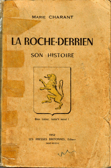 Ar Roc'h-Derrien Charant goloenn